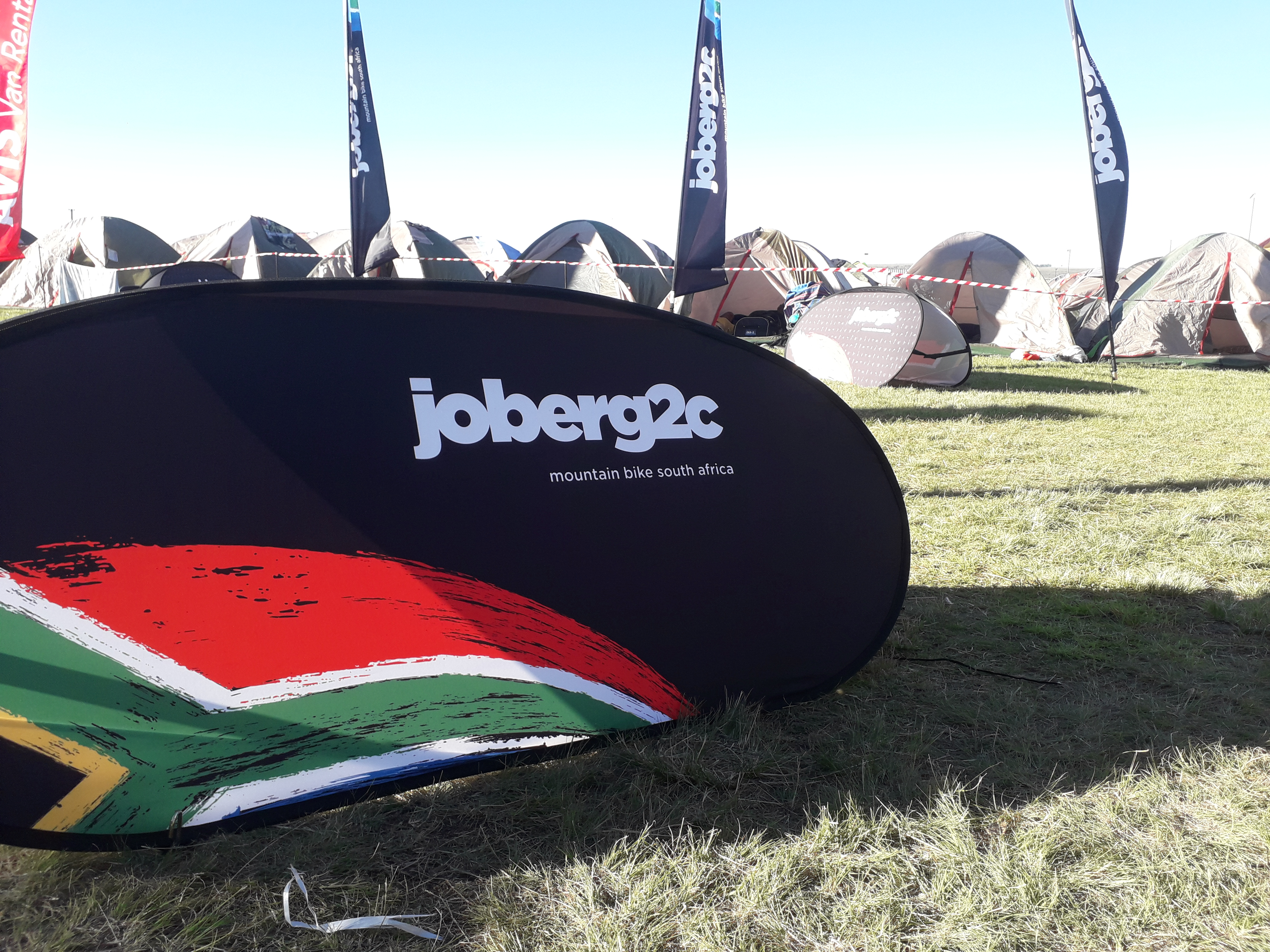 Dag twee van Jober2C in Reitz van Frankfort af